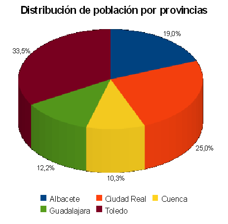 Gráfico de distribución de población en Castilla-La Mancha en el año 2012